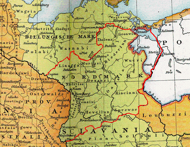 Heiliges Römisches Reich um 1000, Ausschnitt Nordmark